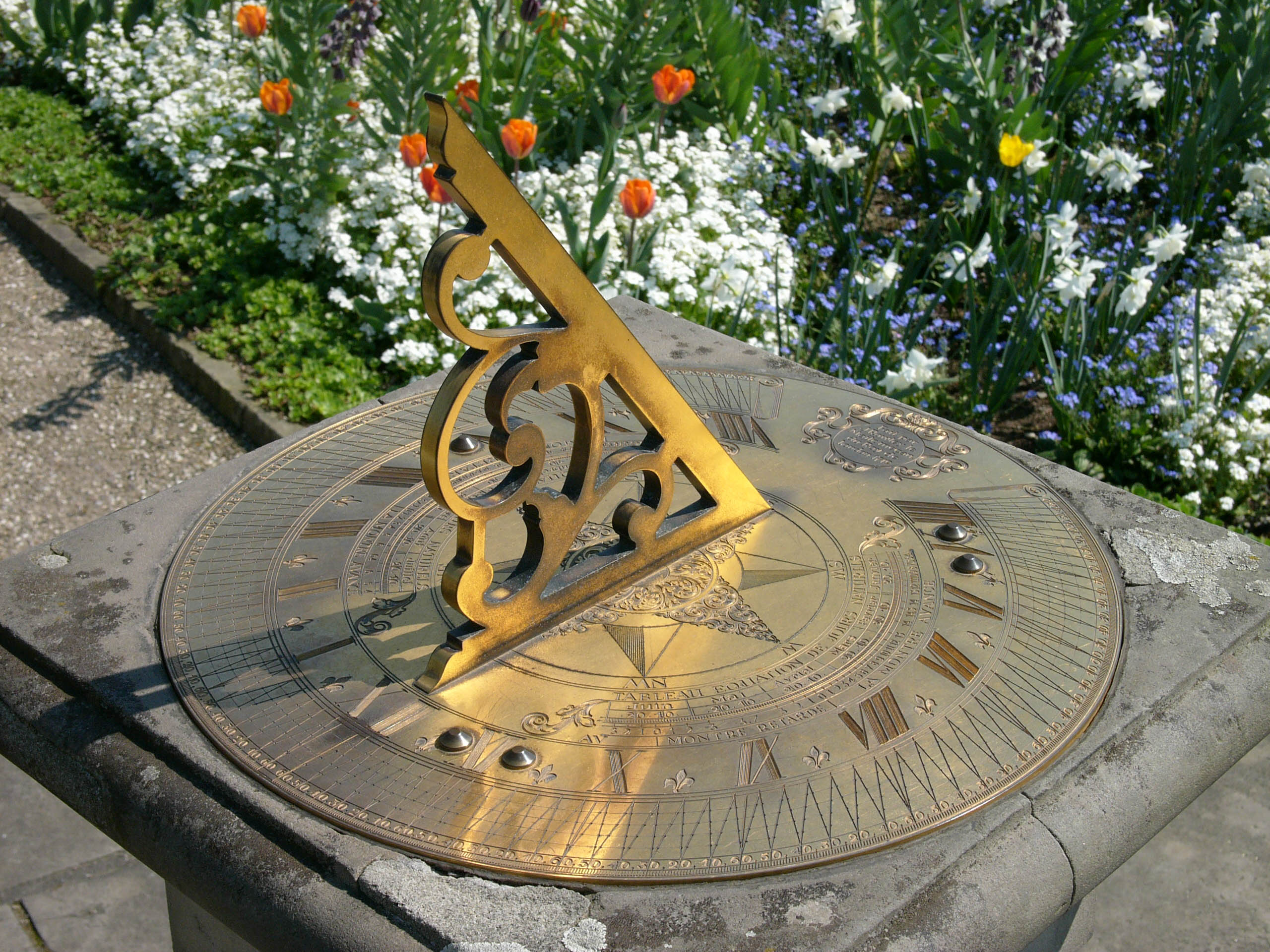 Sundial, Berggarten/Herrenhäuser Gärten, Hannover, Germany